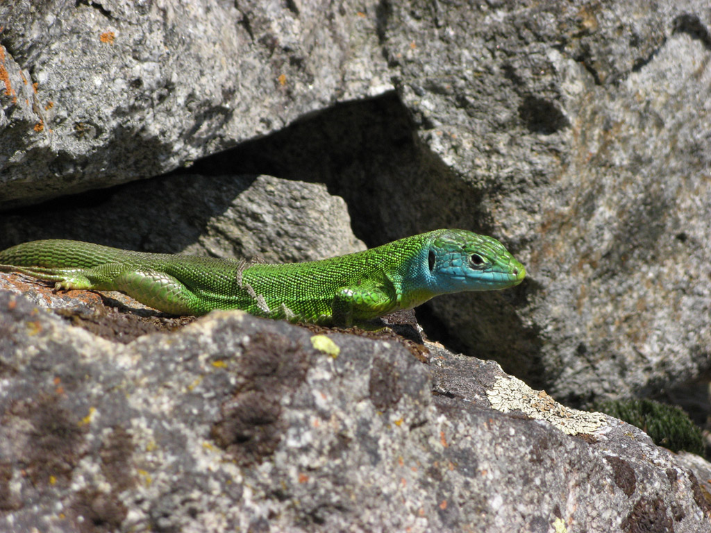 Colourful lizard